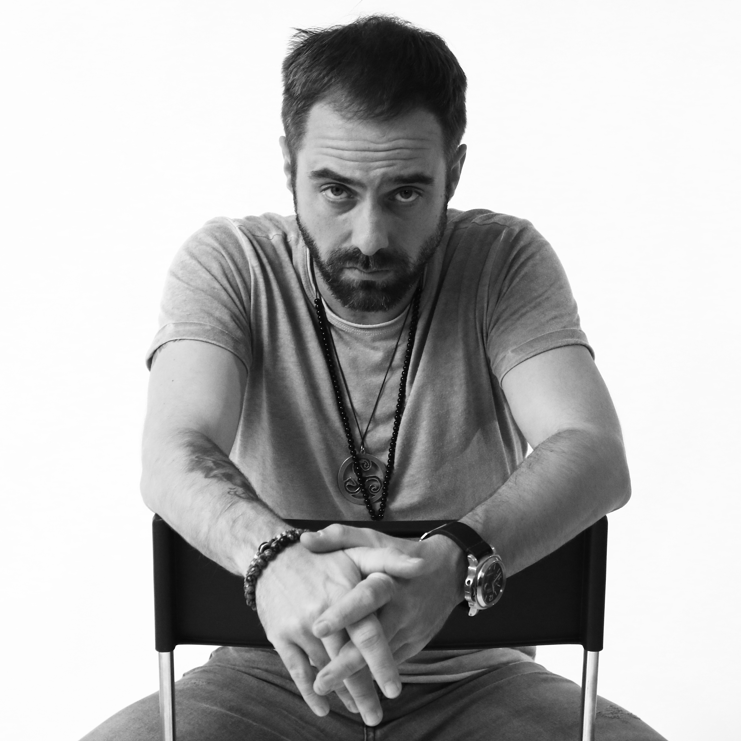 Profilová fotografie